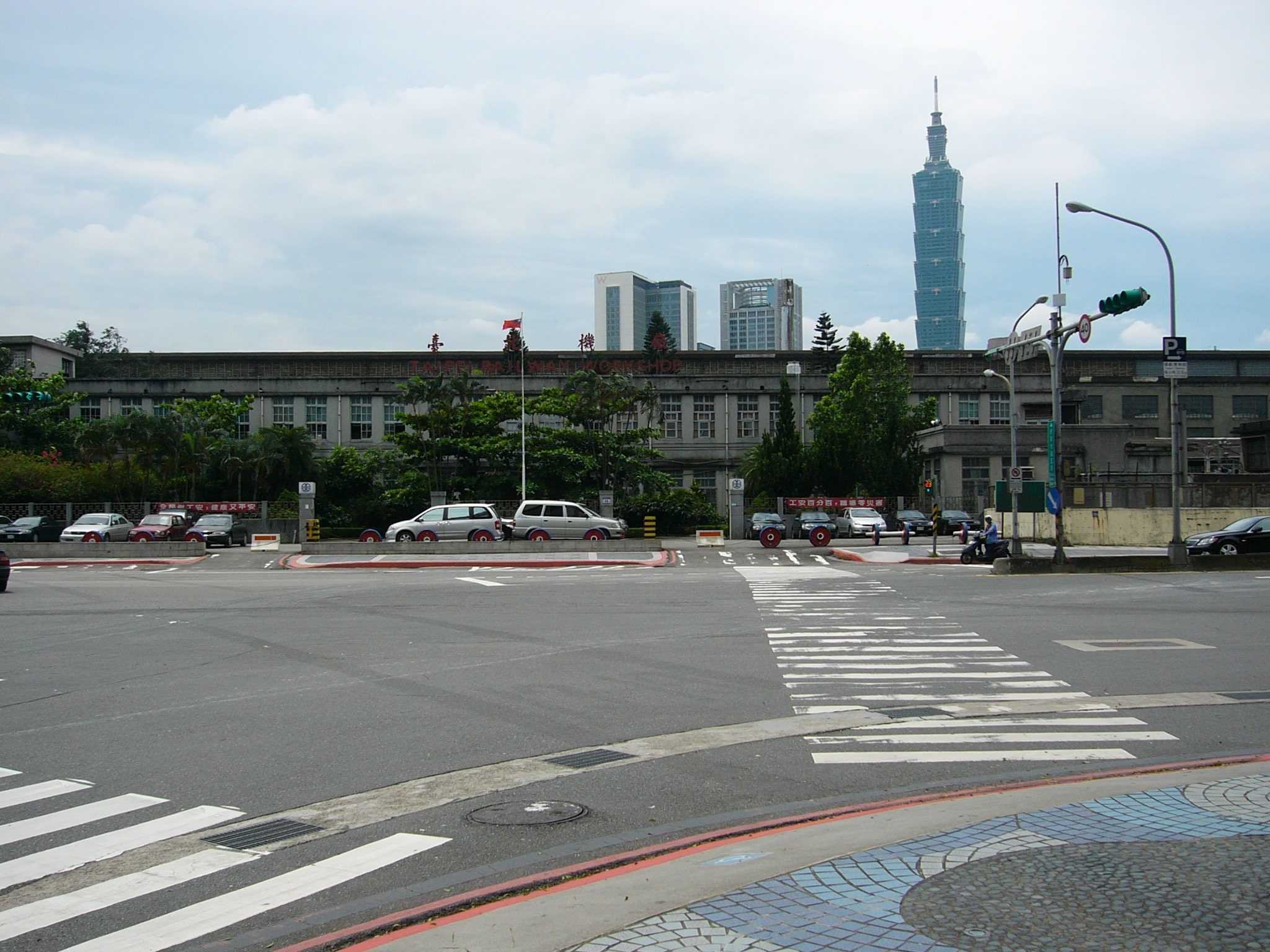 臺灣鐵路管理局臺北機廠正面外觀。